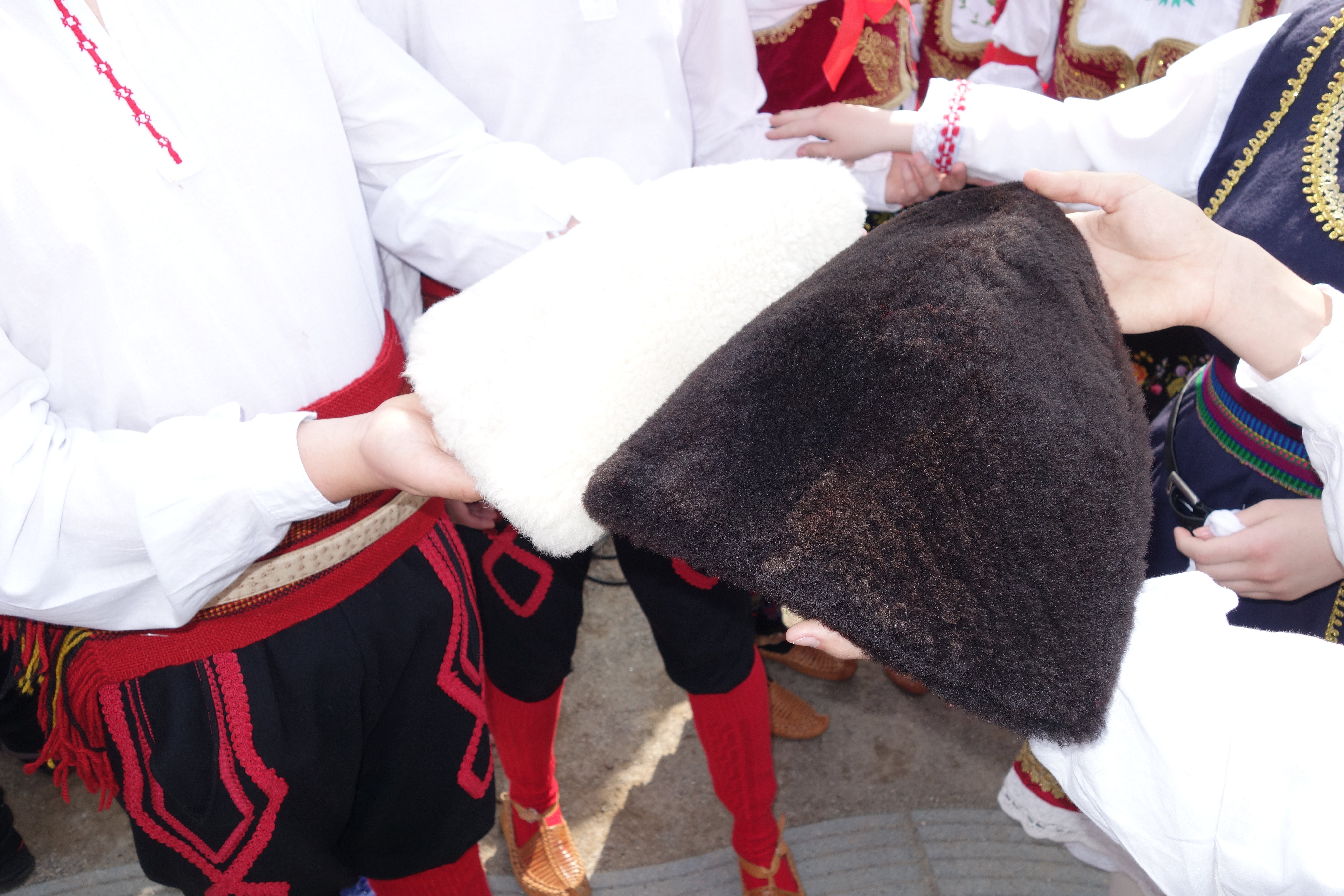 Serbische Volkstanzgruppe mit Lammfellmützen „Šubara“ (Шубара). Zur Maifeier 2014 in Düsseldorf auf dem Johannes-Rau Platz.